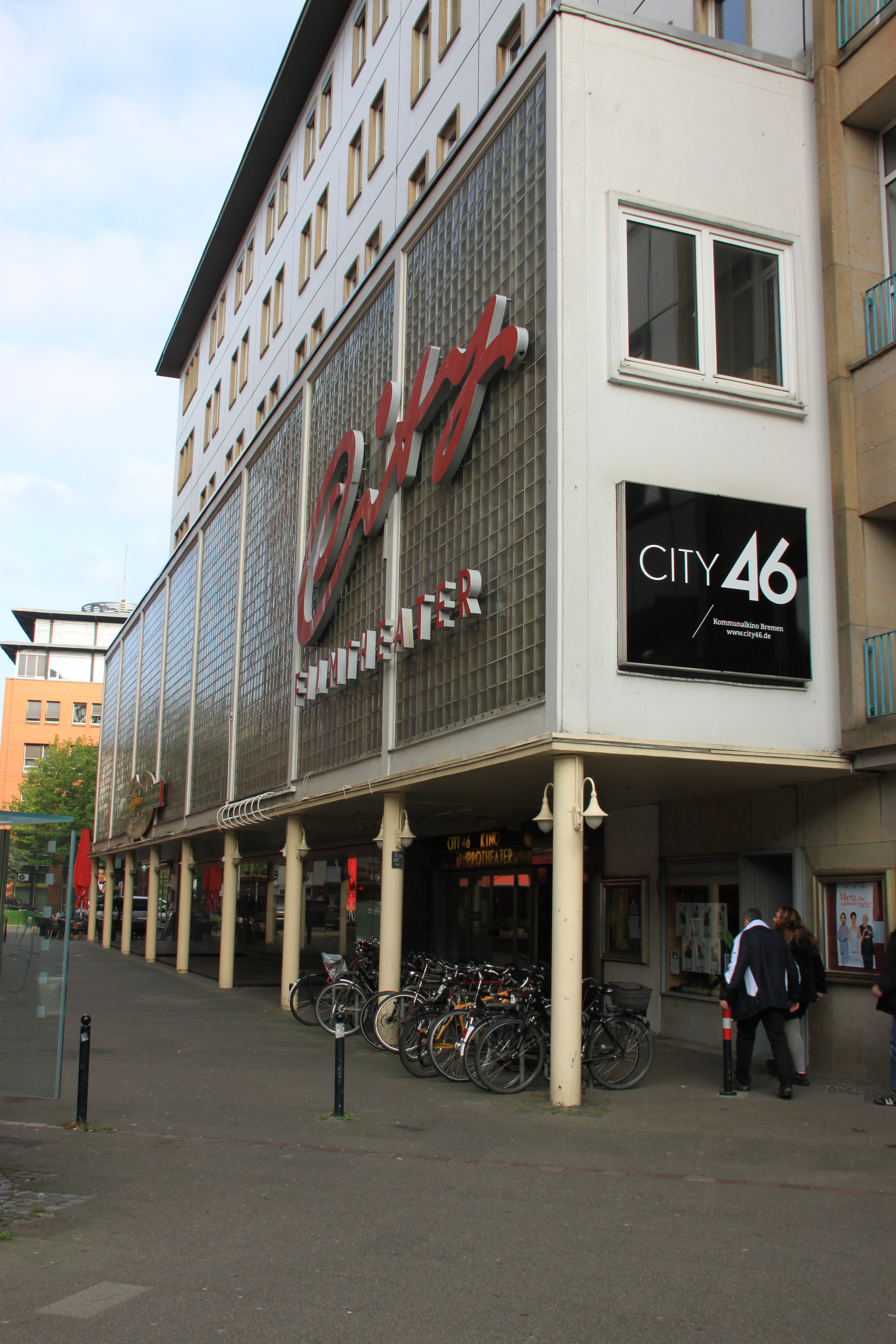 Das Kommunalkino Bremen/City 46 vom Herdentorsteinweg aus gesehen, mit dem Logo des City 46 an der Seite und dem Schriftzug des früheren City Filmtheaters an der Front der Glasbausteinfassade